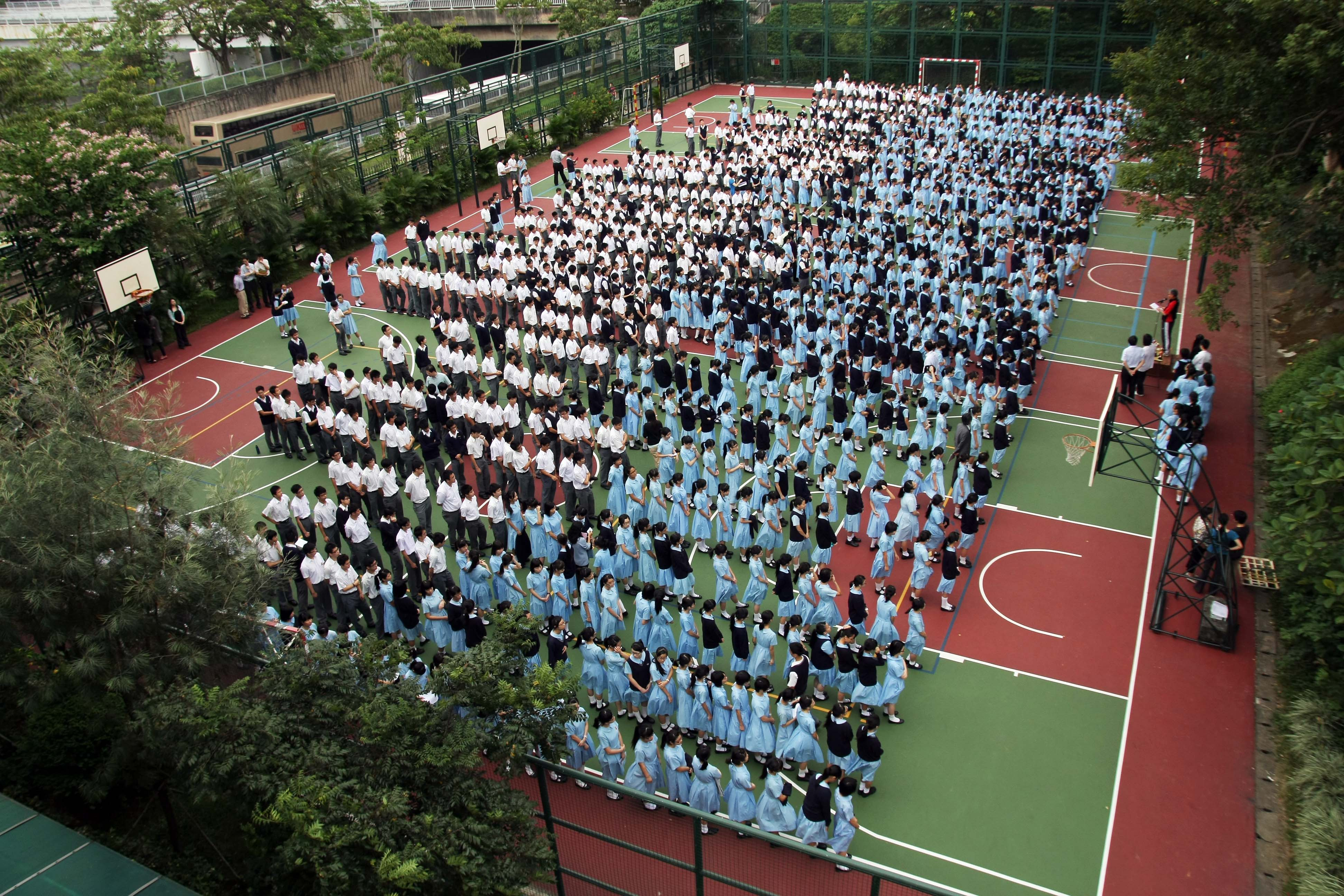 學生在鄧若璠運動場早上集會情況